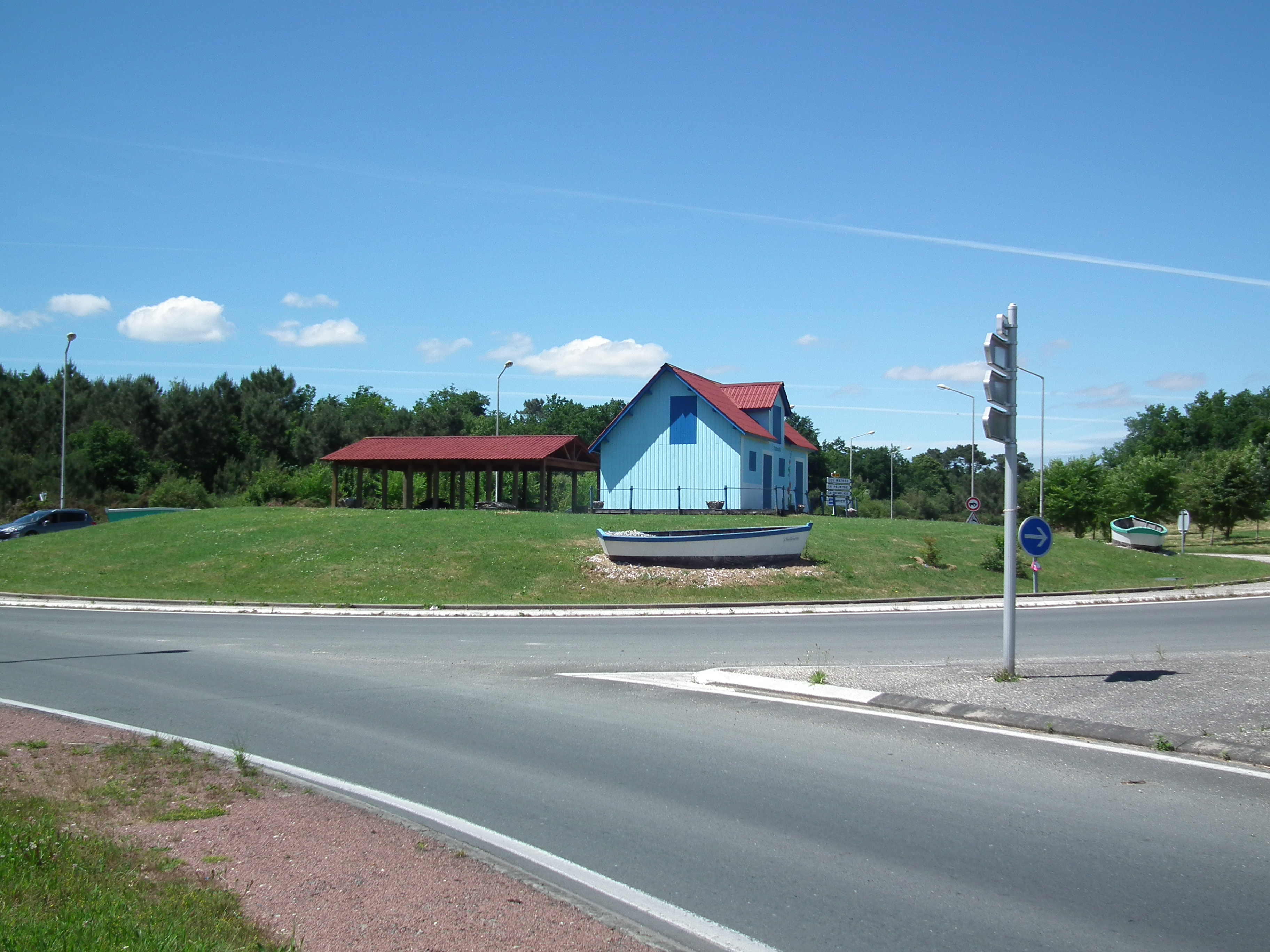 Rond-point à l'entrée d'Etaules